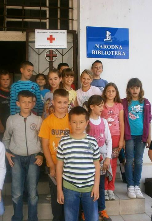 Српски (ћирилица): Наши чланови испред Библиотеке